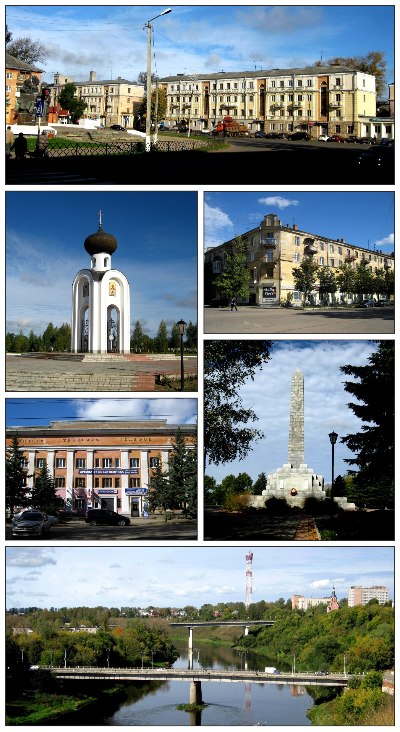 Коллаж из фотографий собственной съёмки.